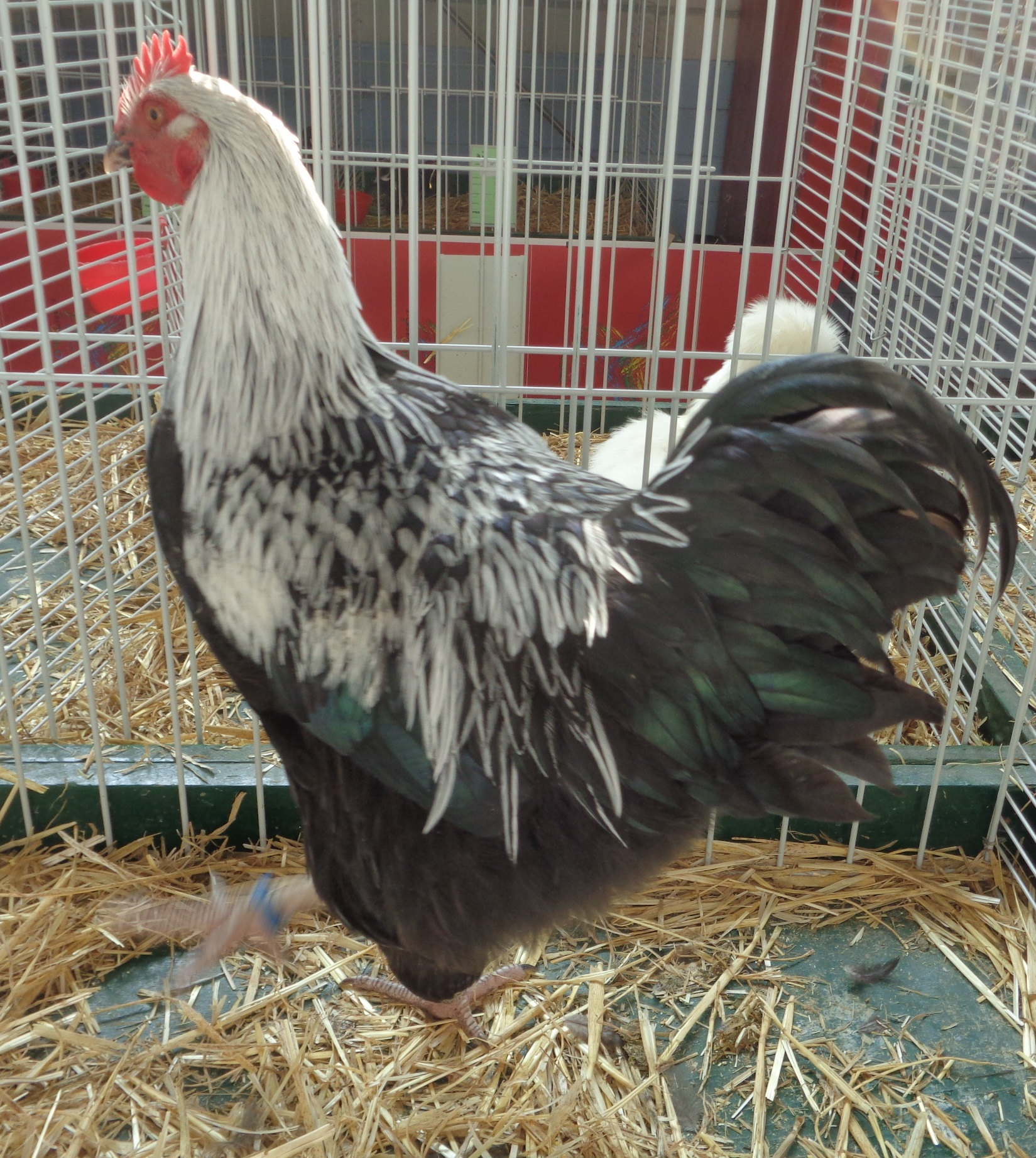 Coq argenté